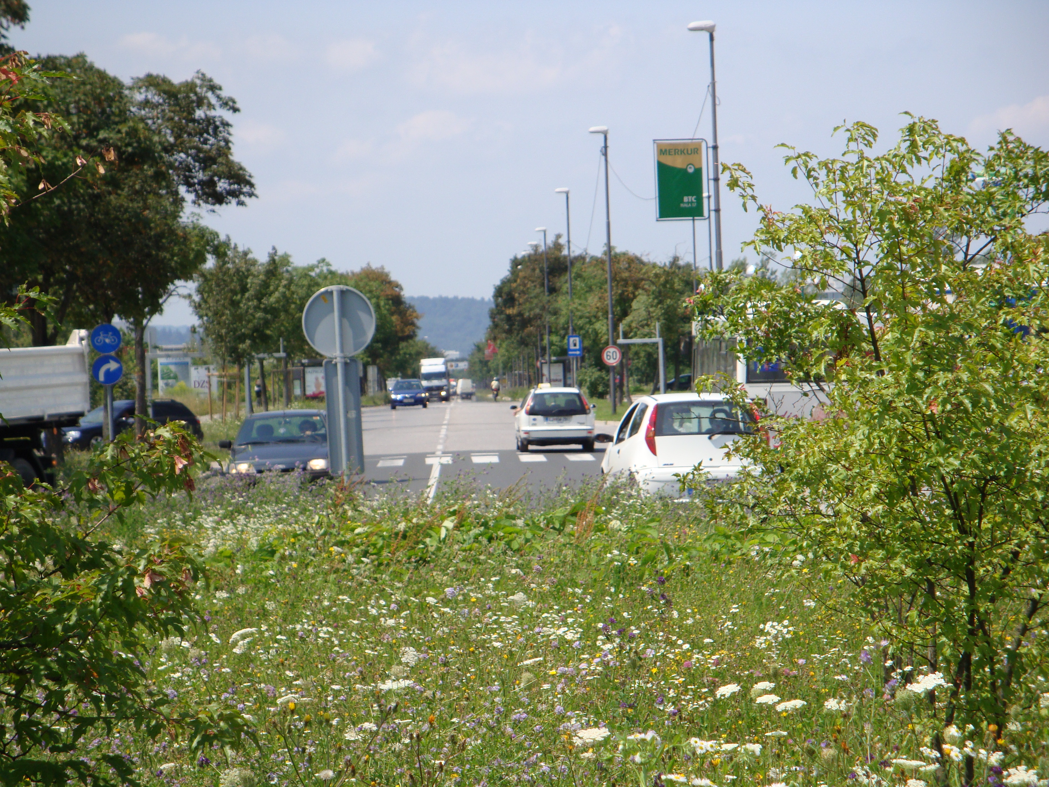 Letališka cesta v Ljubljani